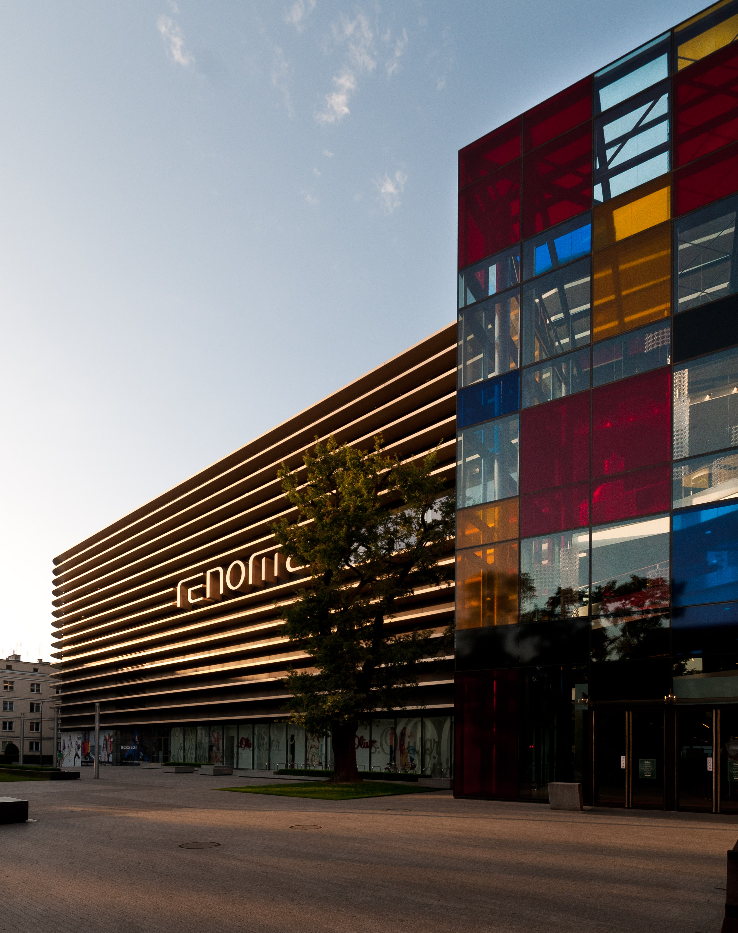 Renoma, Wrocław, widok na nowy budynek od ul. Podwale